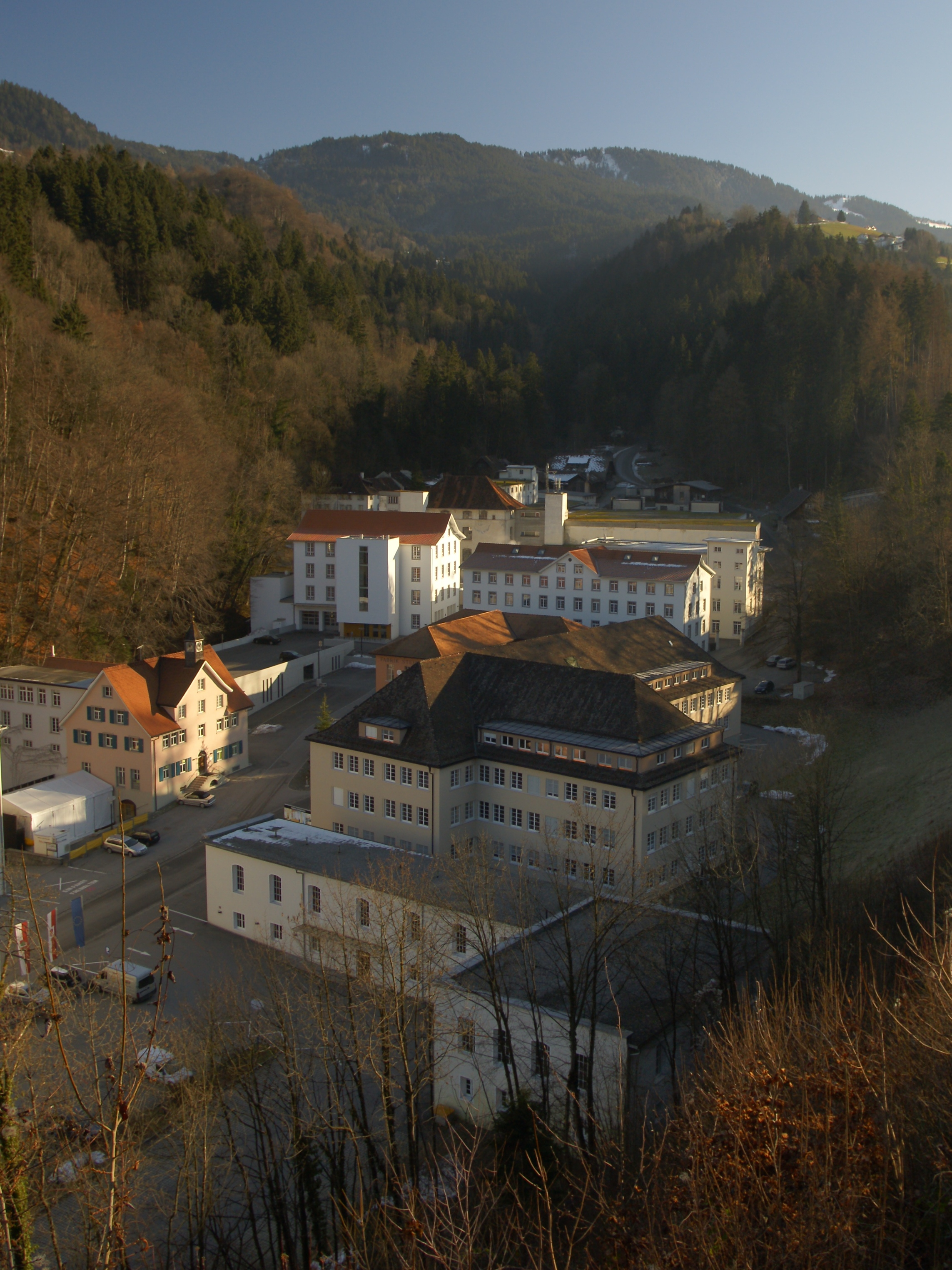 ehemals Textilfabrik der Firma F.M.Hämmerle im Steinebach; Dornbirn, Vorarlberg. *** 2014 Veröffentlicht: Barbara Motter & Barbara Grabher-Schneider in "Orte-Fabriken-Geschichten ISBN 978-37099-7097-3